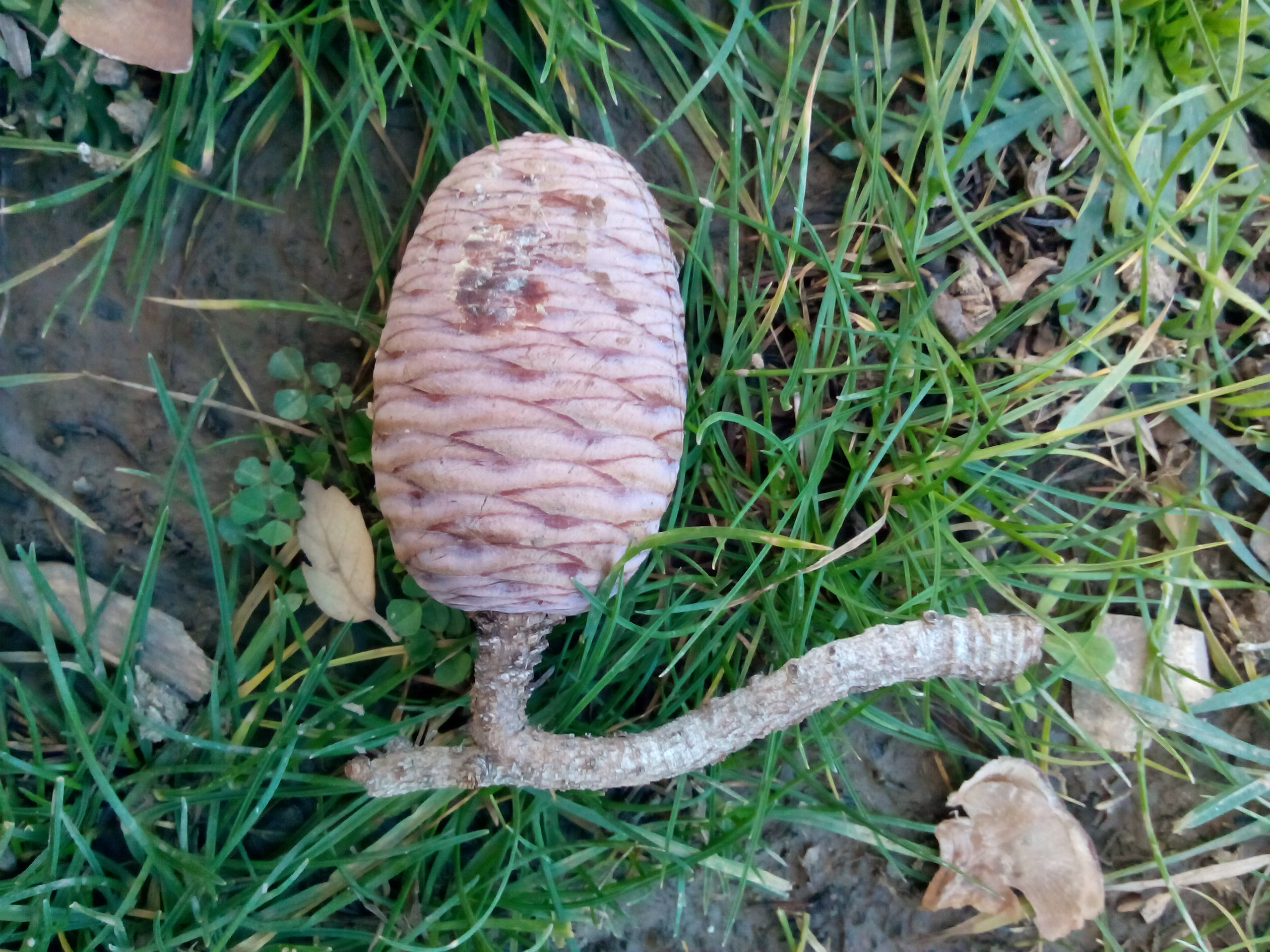 parc national de Belezma